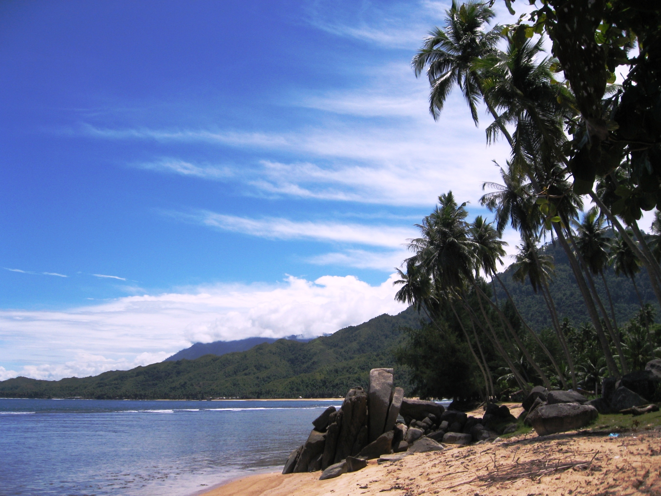 Pantai dekat Tapak Tuan